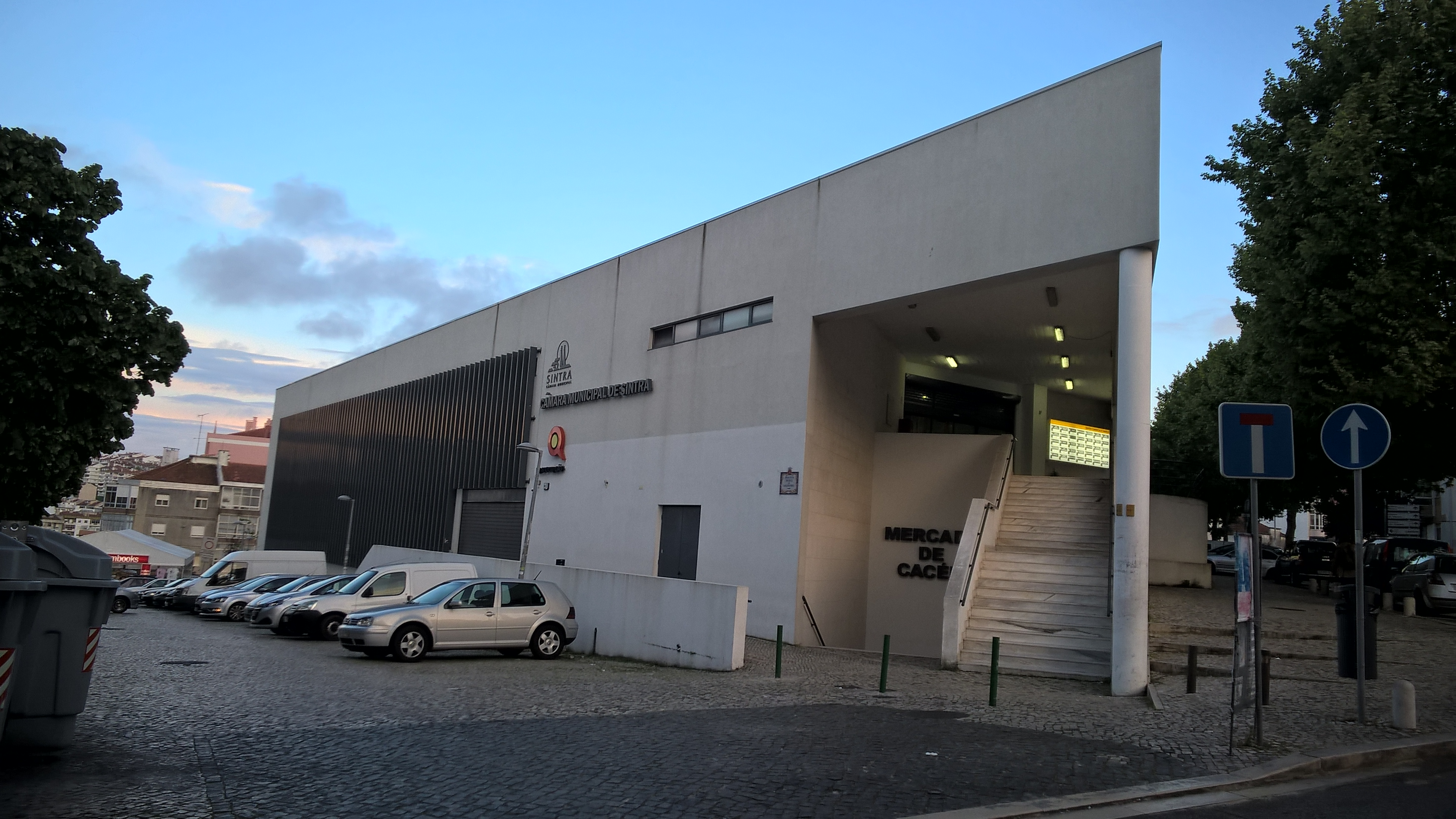 Mercado e Loja do Cidadão Lado norte